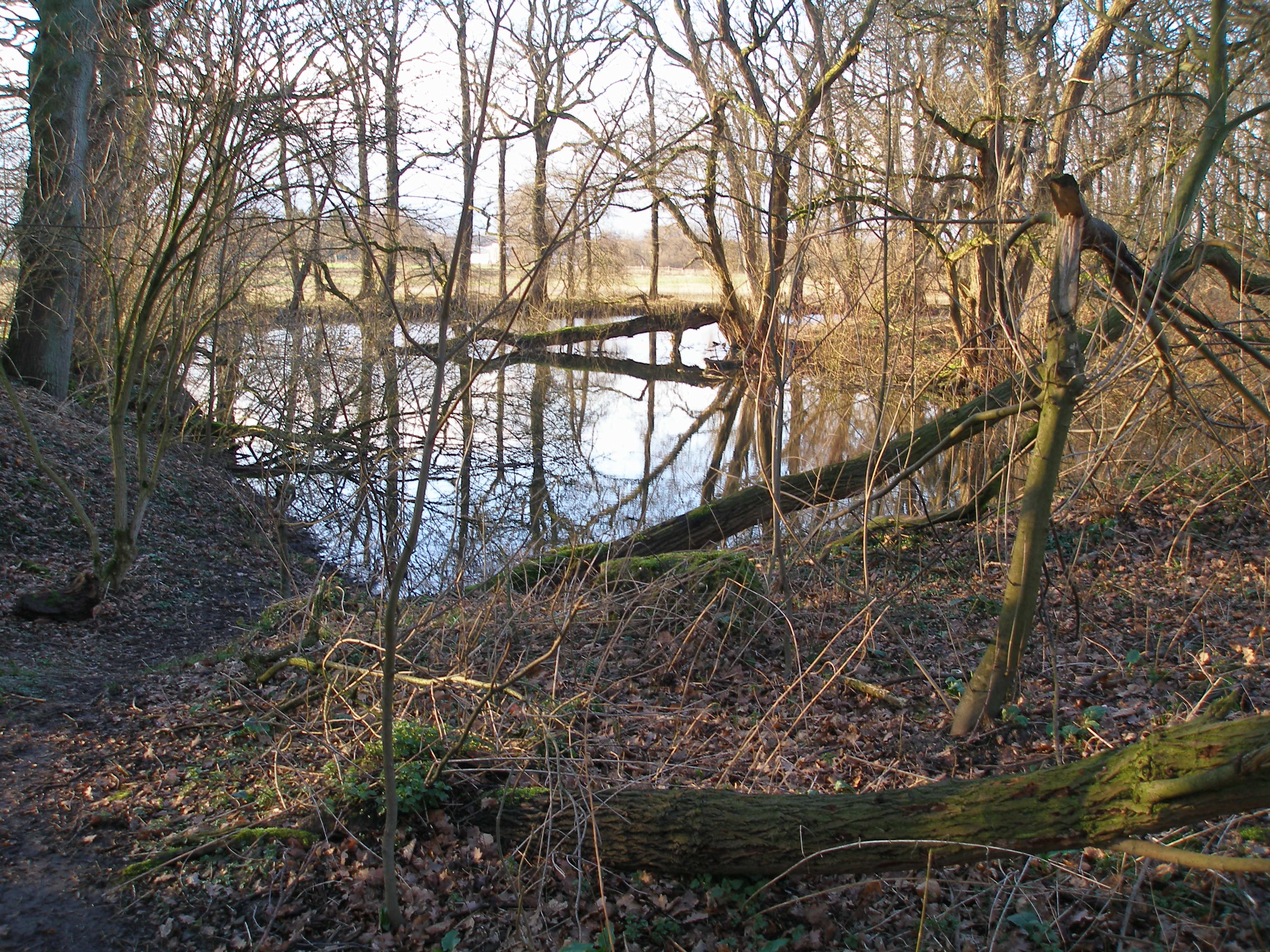 Teil der Gräfte des 1966 abgebrochenen Wasserschlosses Haus Heyde, Unna; Bereich im Naturschutzgebiet „Uelzener Heide, Mühlhauser Mark“